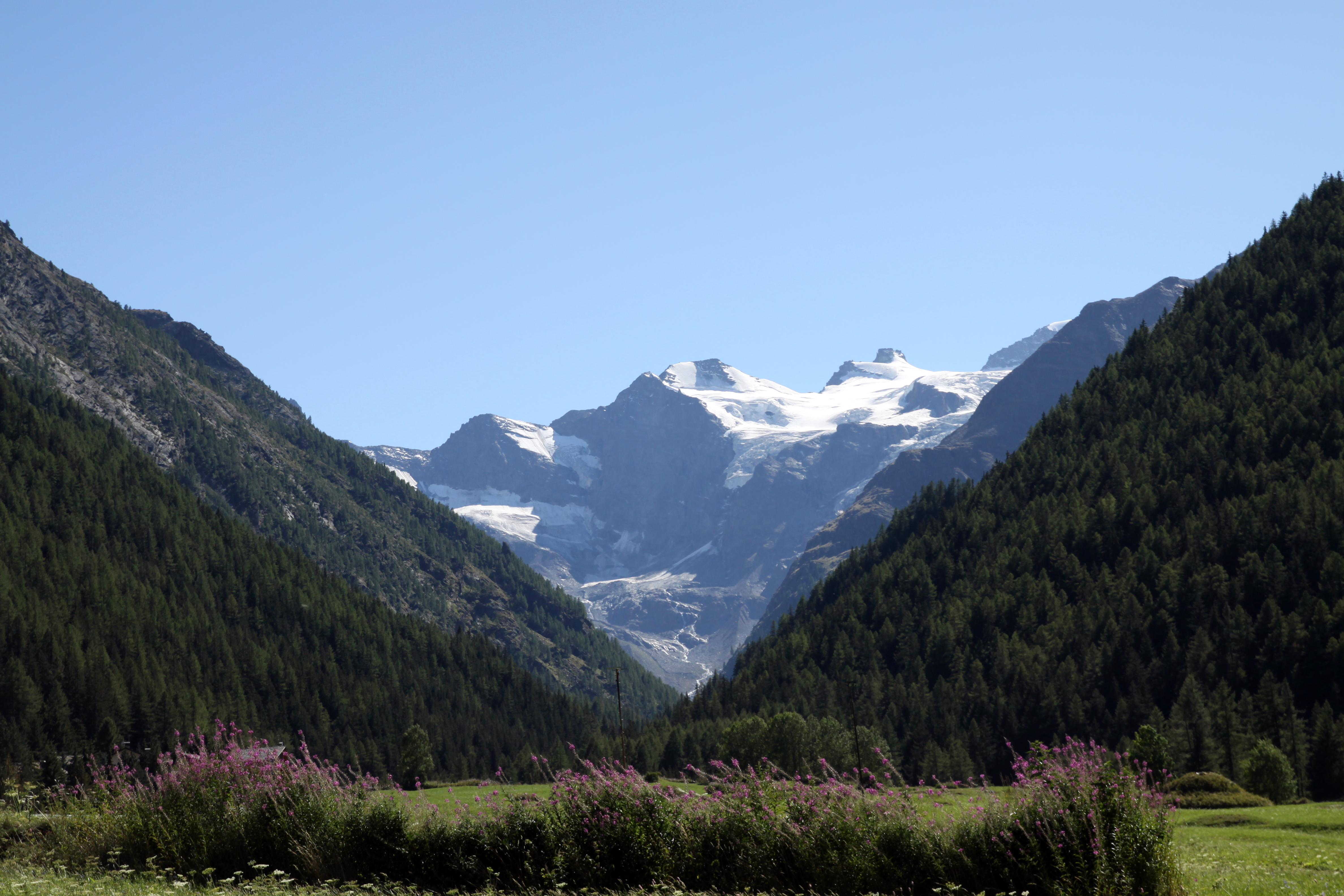 Il massiccio del Gran Paradiso in Agosto visto da Cogne This is a photo of a monument which is part of cultural heritage of Italy.